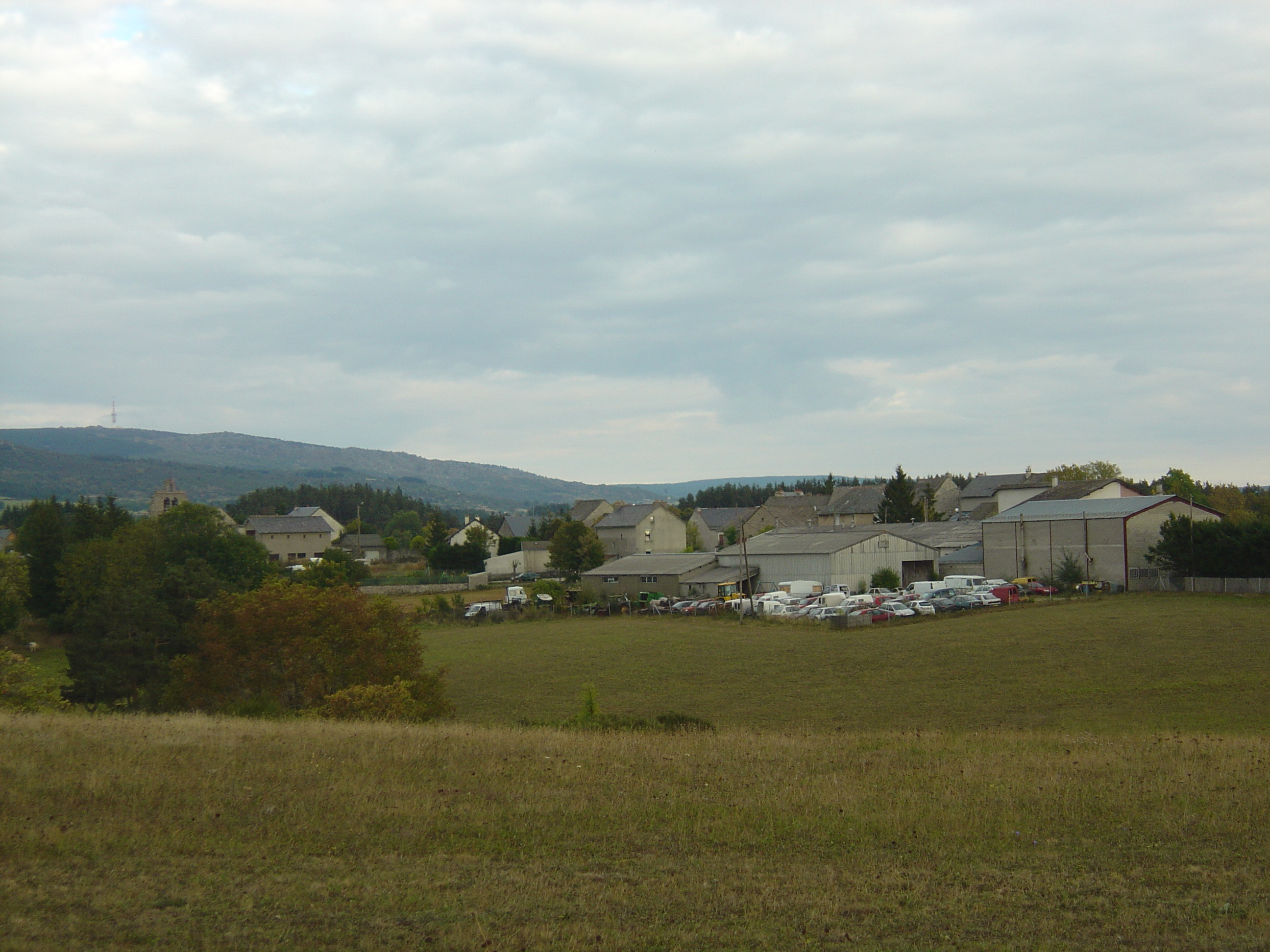 Vue générale du village de Saint-Amans (48). Vue sur le Truc de Fortunio au fond à gauche